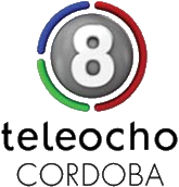 Logo Canal 8 Cordoba